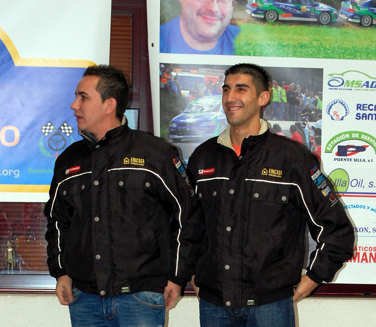 Alberto Meira y Bañobre en 2009